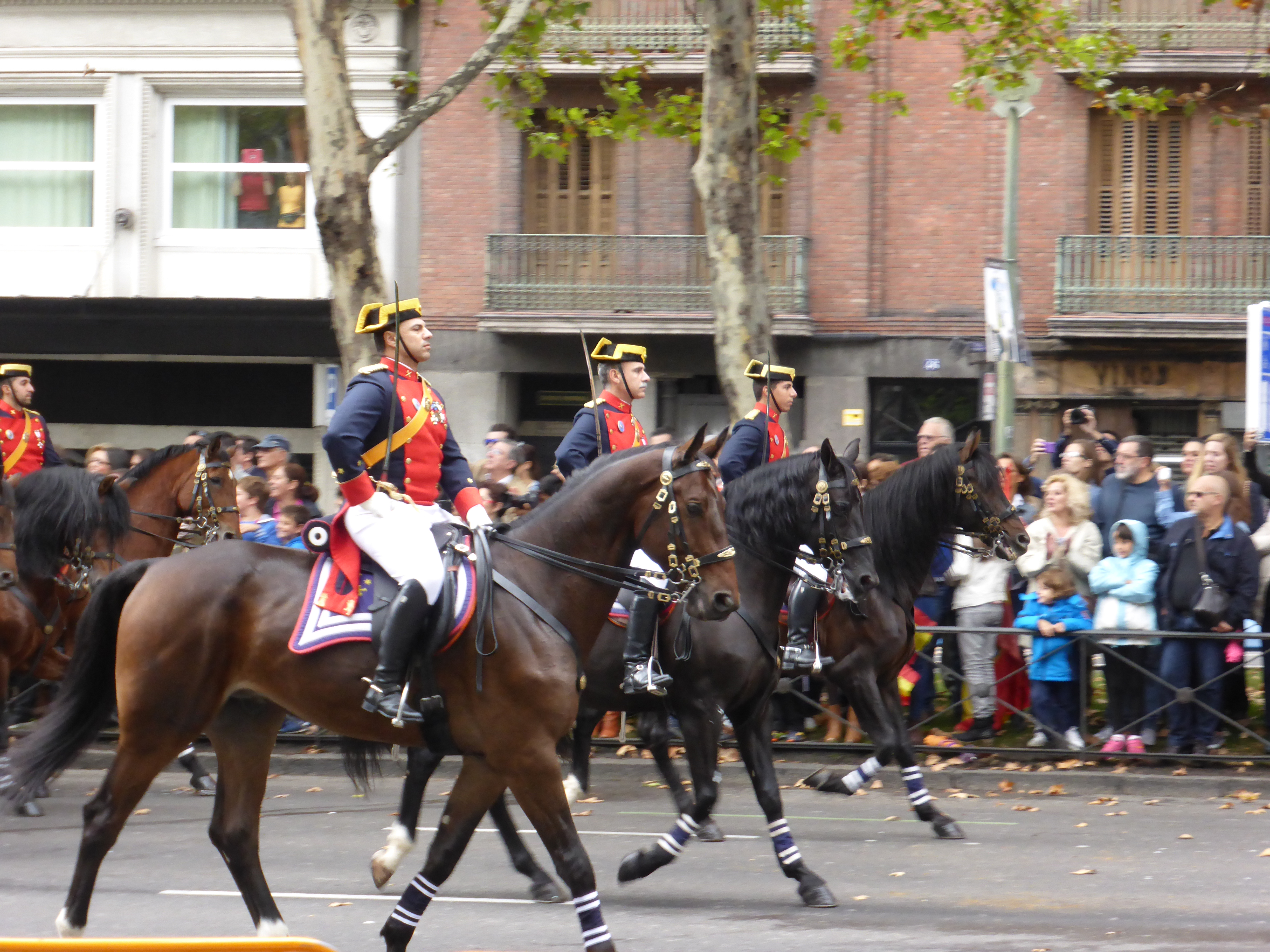 El Día de la Fiesta Nacional de España (12 de octubre) tiene lugar un tradicional desfile militar, que incluye unidades de los diferentes ejércitos (del Aire, Armada, Tierra) y cuerpos de seguridad, como la Guardia Civil.